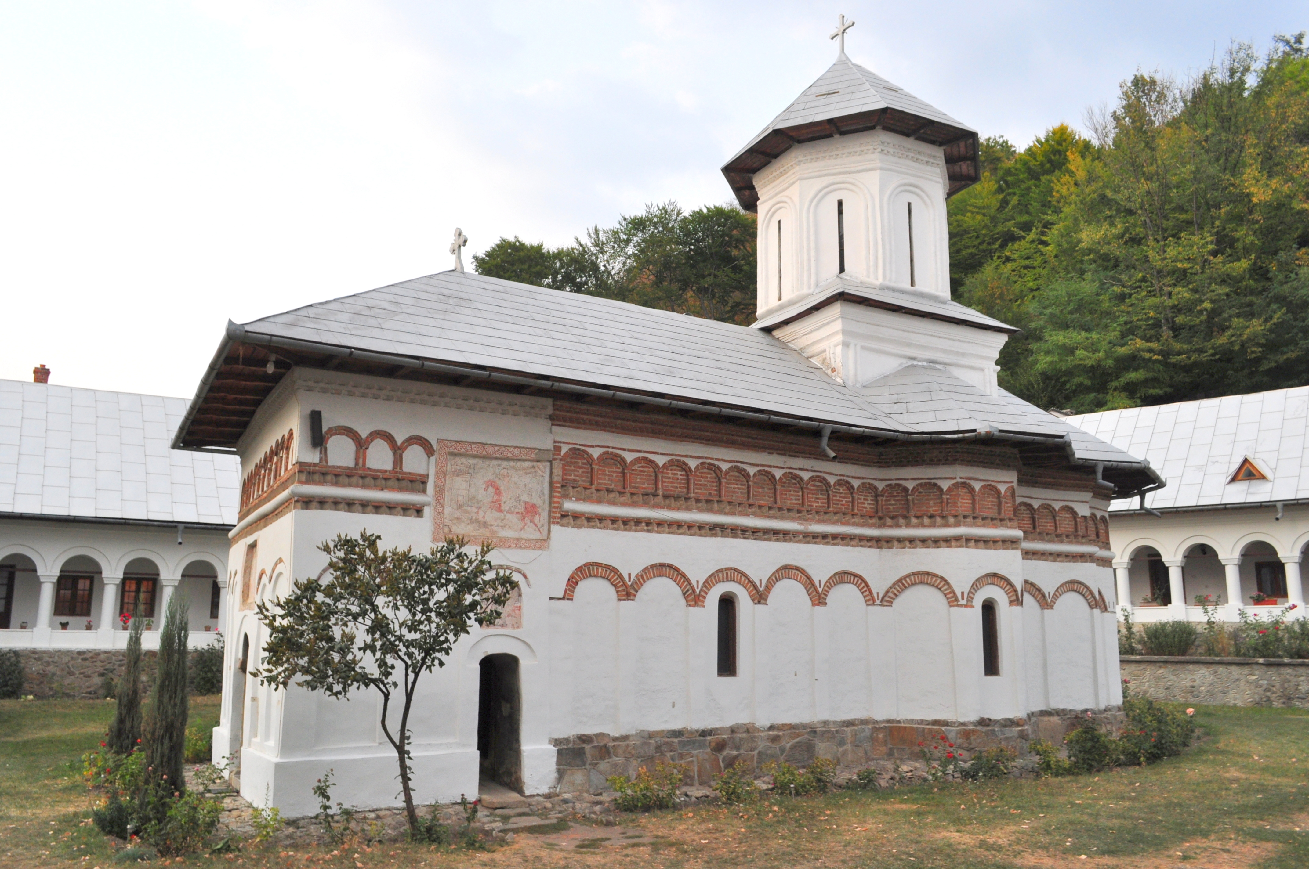 Ansamblul schitului Crasna, județul Gorj